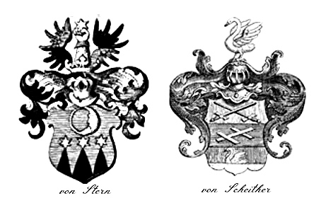 Familien Wappen der Familien von Stern und von Scheither, Herren zu Tüschow